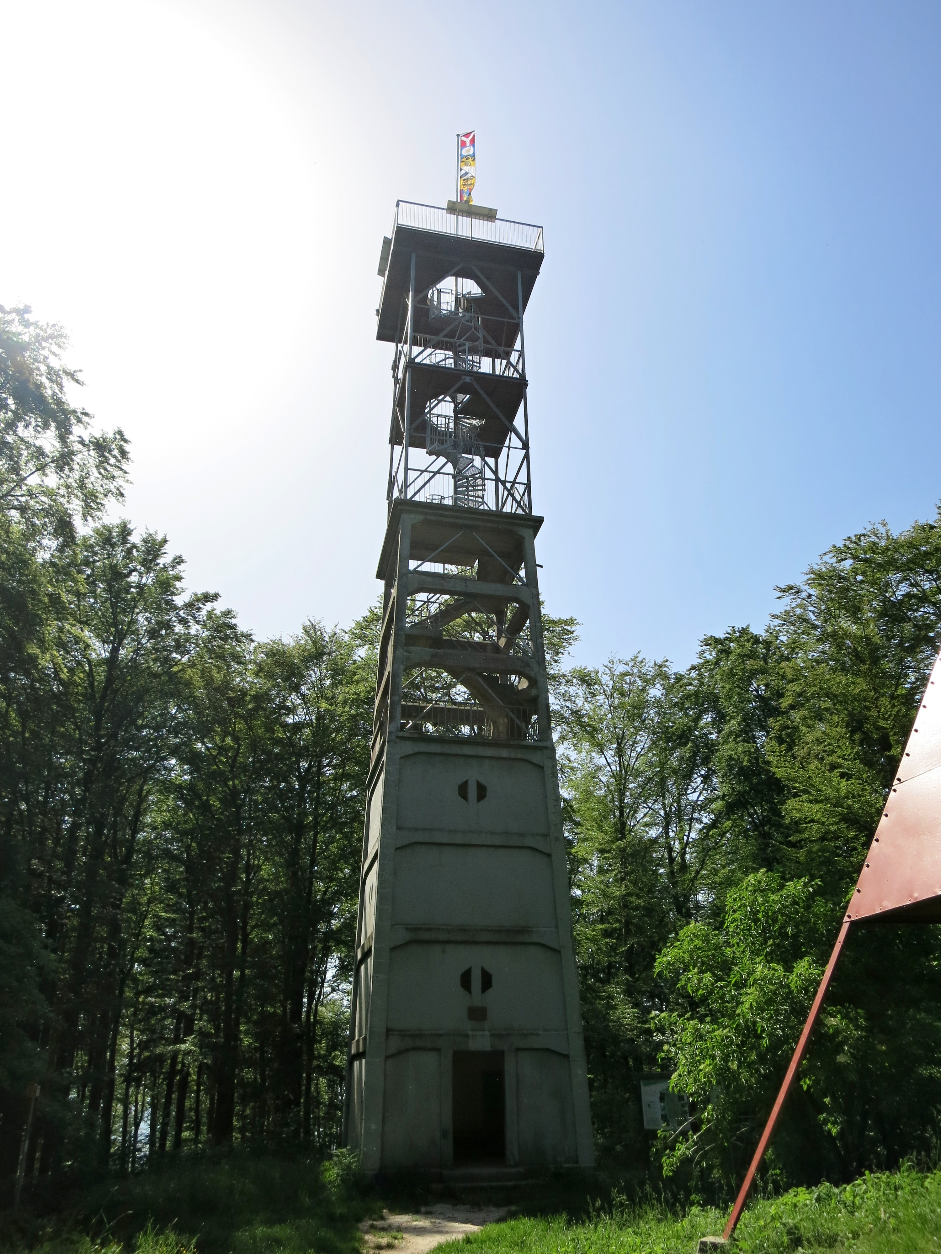 Wisenbergturm